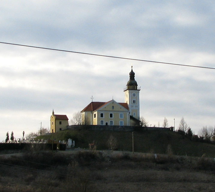 Župna Crkva Sv. Katarine, Zagorska Sela